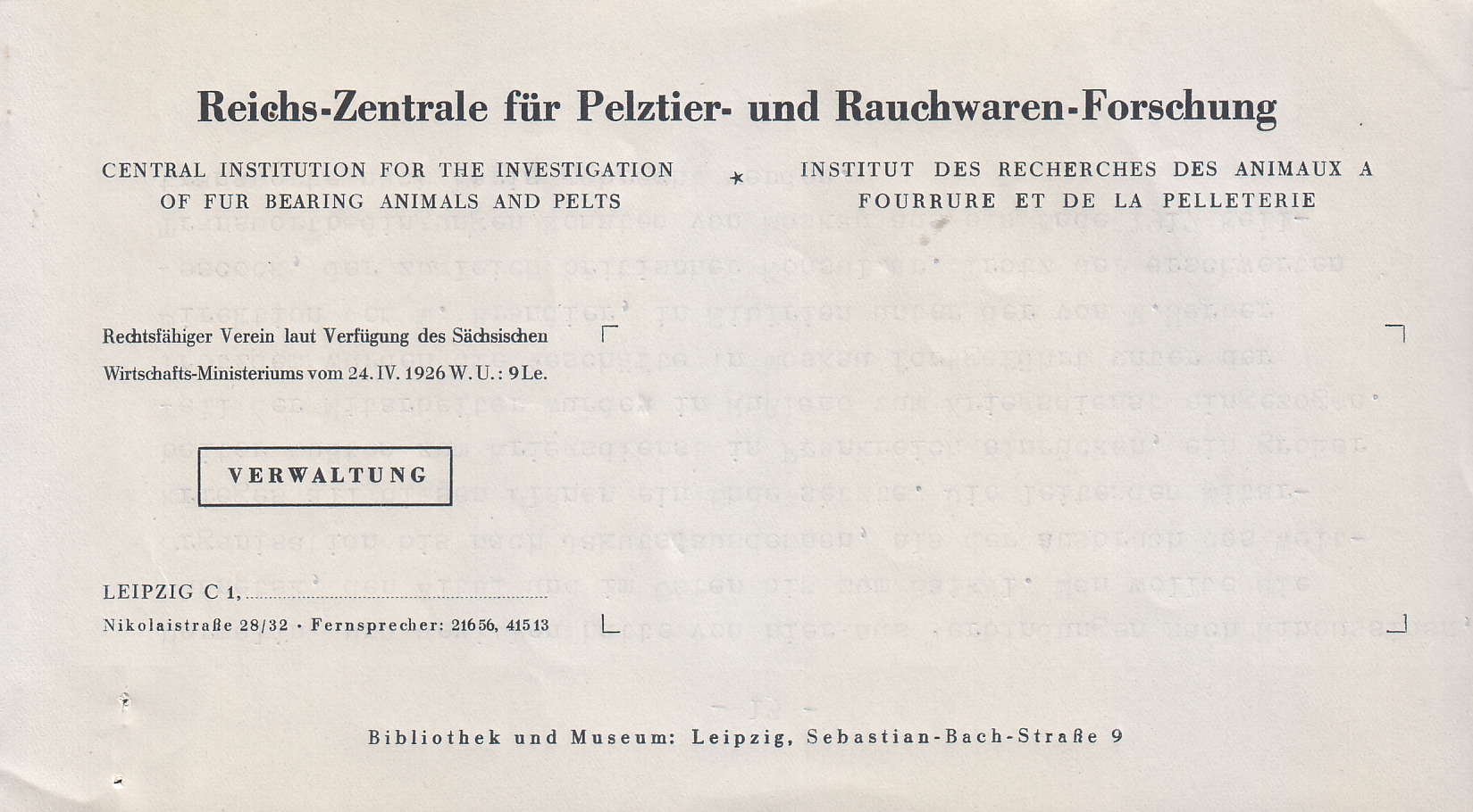 Reichs-Zentrale für Pelztier- und Rauchwaren-Forschung. Briefkopf und Brieffuß der Verwaltung (Blatt verkürzt). Central Institution for the Investigation of Fur Bearing Animals and Pelts Institut des recherches des animaux a fourrure et de la pelleterie Rechtsfähiger Verein laut Verfügung des Sächsischen Wirtschafts-Ministeriums vom 24. VII.1926 W. U.: 9Le. Leipzig C 1, Nikolaistraße 28/32 Bibliothek und Museum: Leipzig, Sebastian-Bach-Straße 9